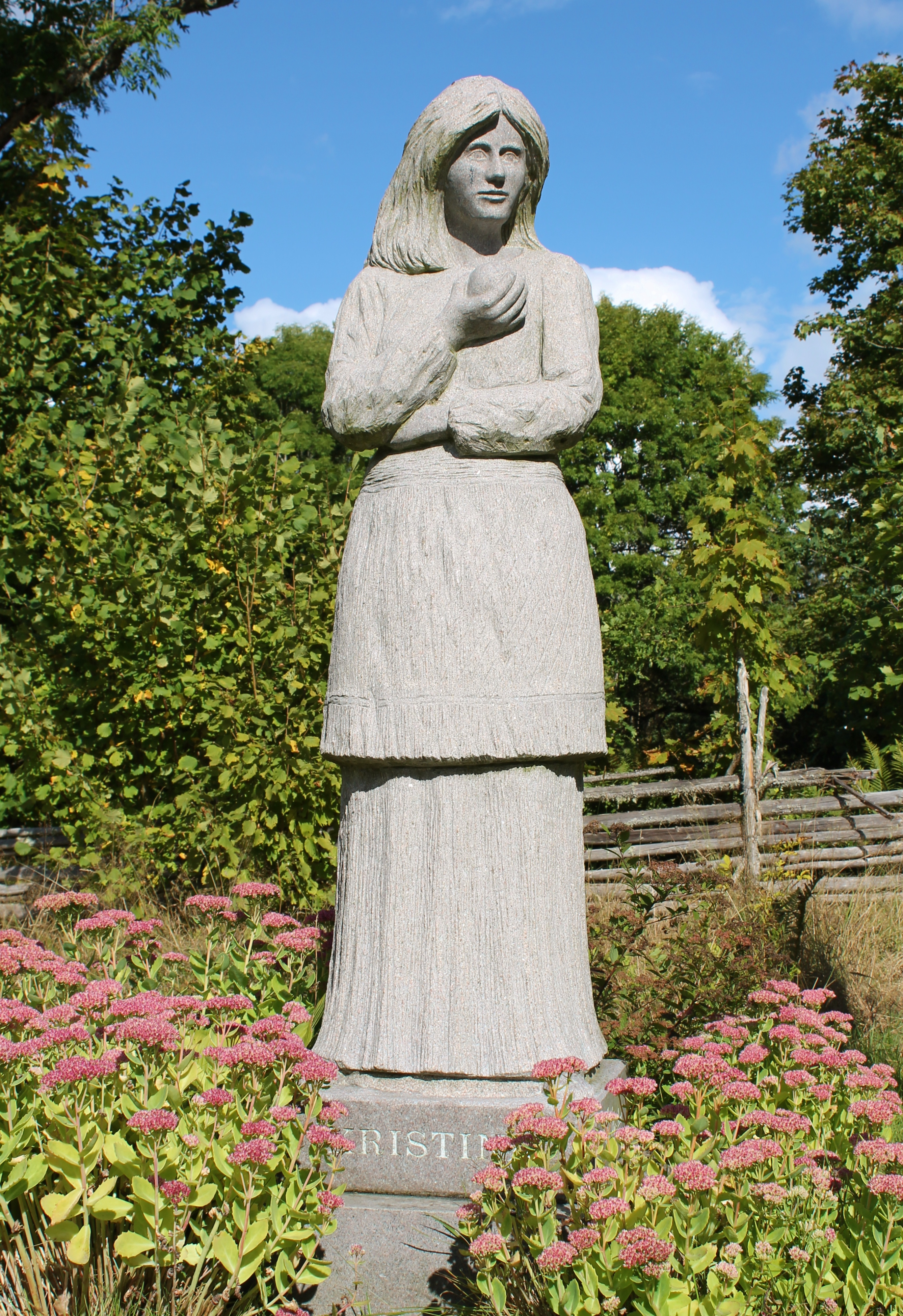 Duvemåla. Staty över Vilhelm Mobergs romangestalt Kristina från Duvemåla.